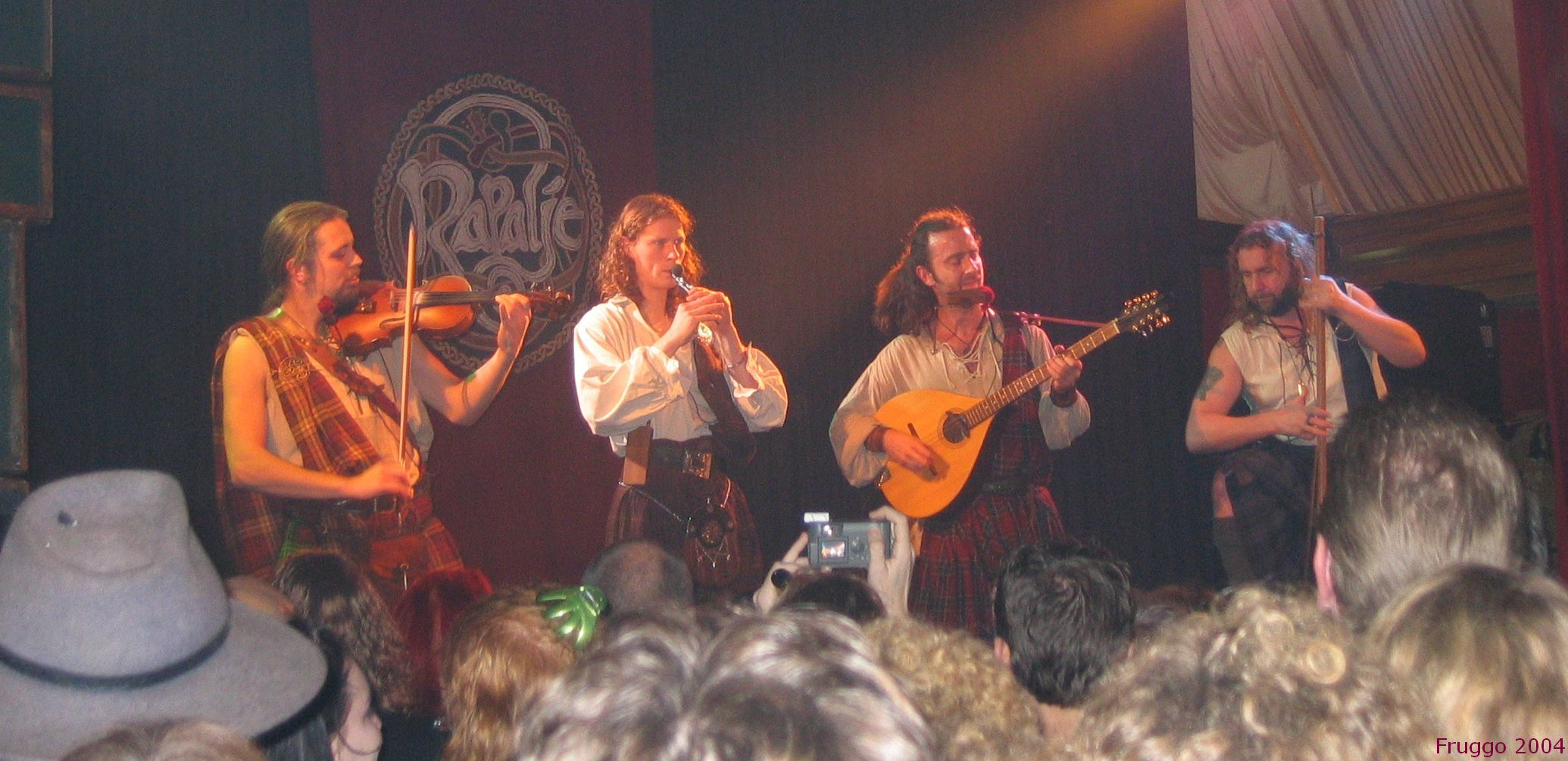 CD-presentatie van Rapalje in Groningen (Nederland), 16 december 2004. (sorry voor verkeerde jaartal in titel, het is echt 2004)